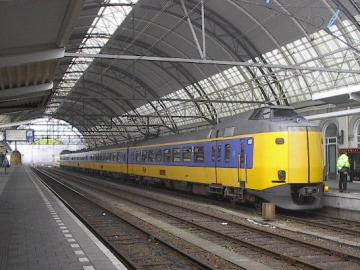 ICM onder perronoverkapping in Zwolle